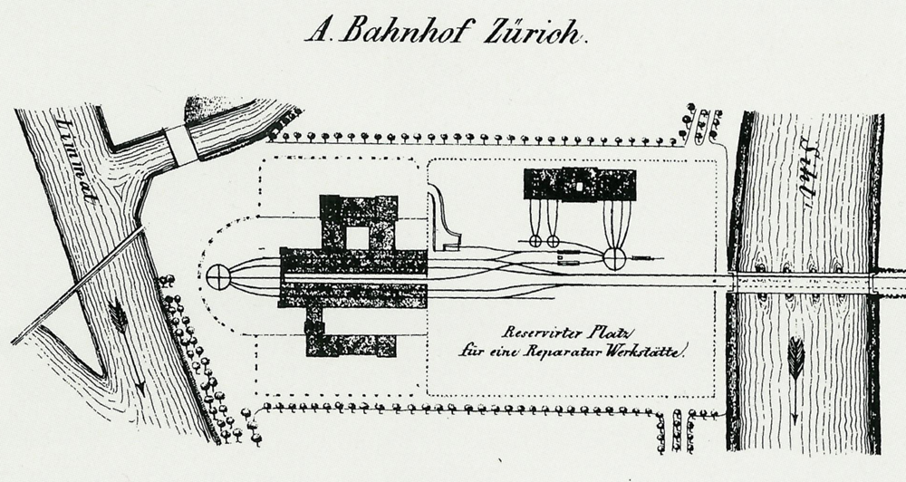 Grundrisse des Nordbahnhofs in Zürich nach dem Entwurf von Gustav Albert Wegmann und des Nordbahnhofs Baden von Ferdinand Stadler.